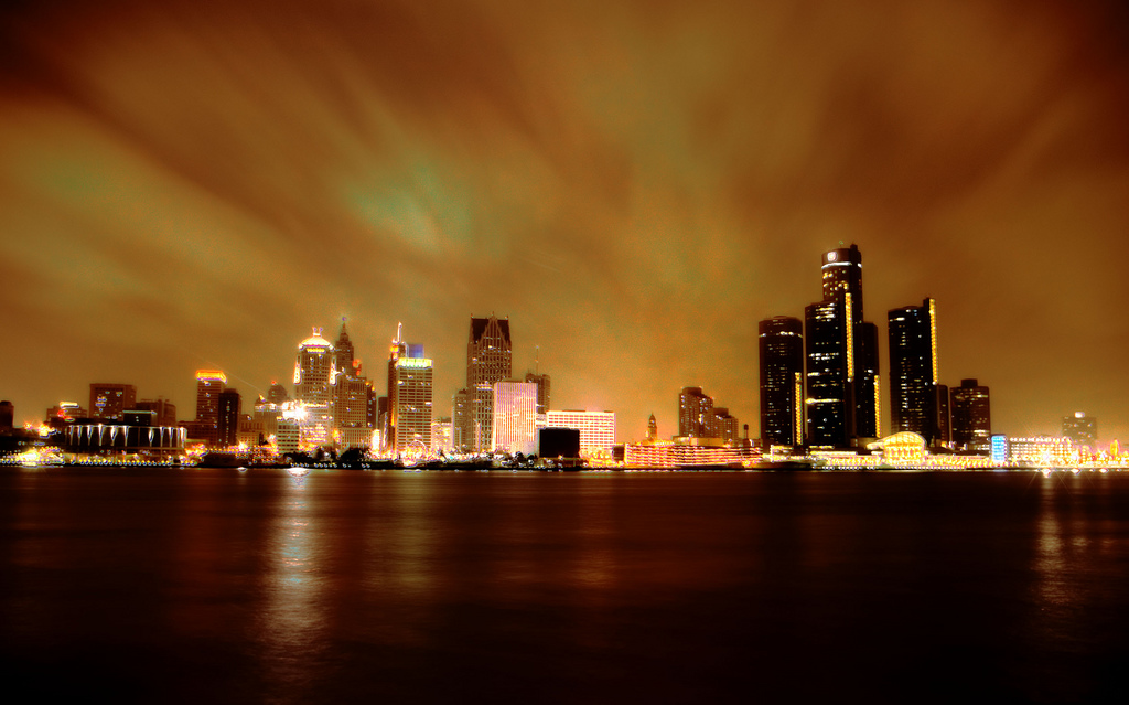 Detroit, MI